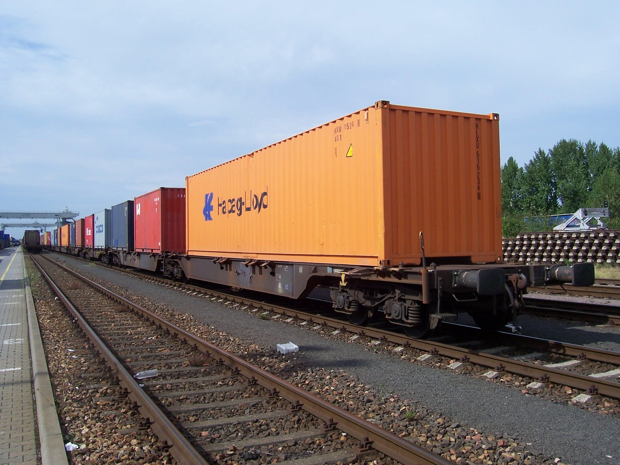 Ein Güterzug mit Containern im Mannheimer Containerhafen